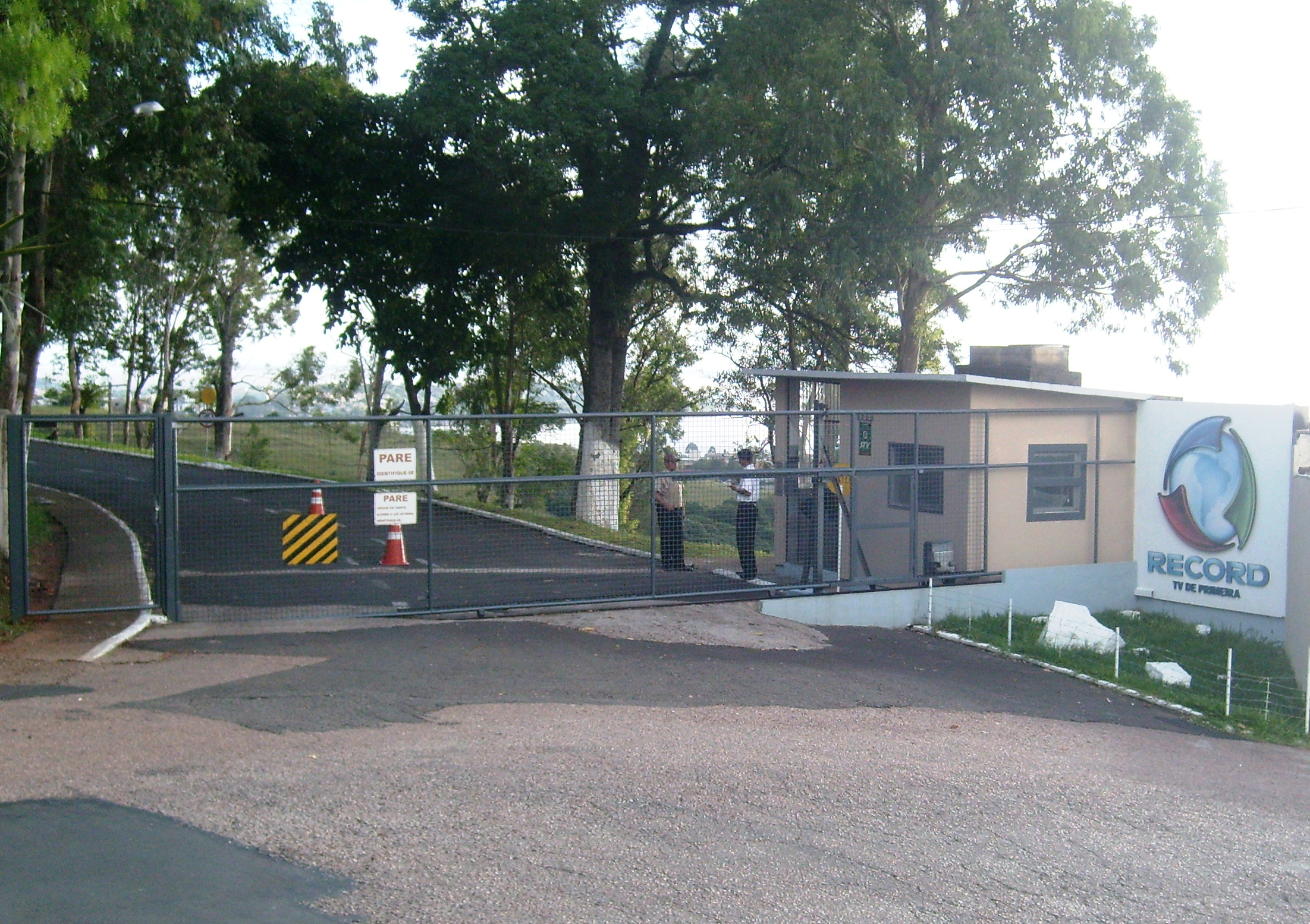 Entrada da sede da TV Record RS em janeiro de 2010.